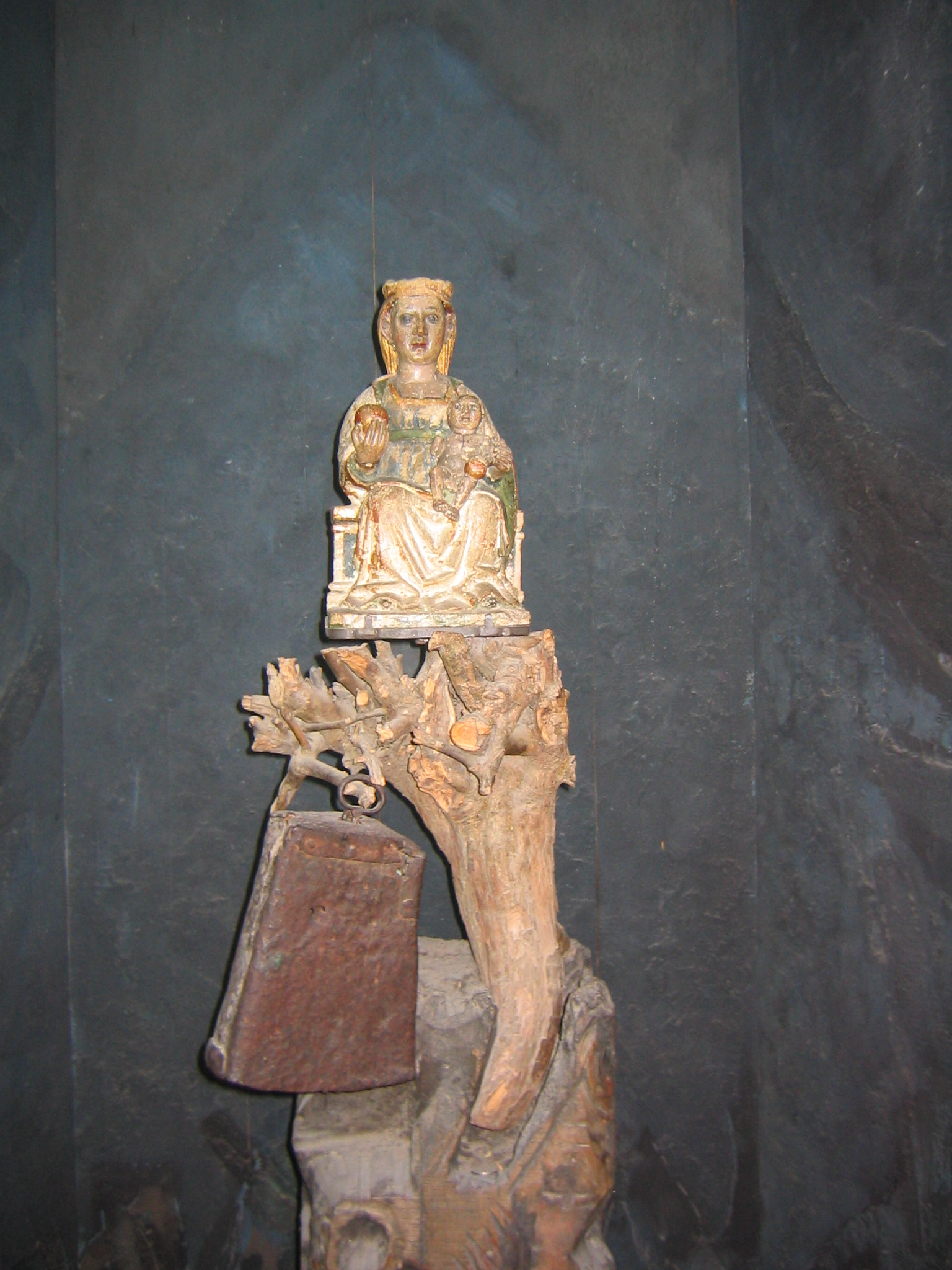 Virgen de Arantzazu.